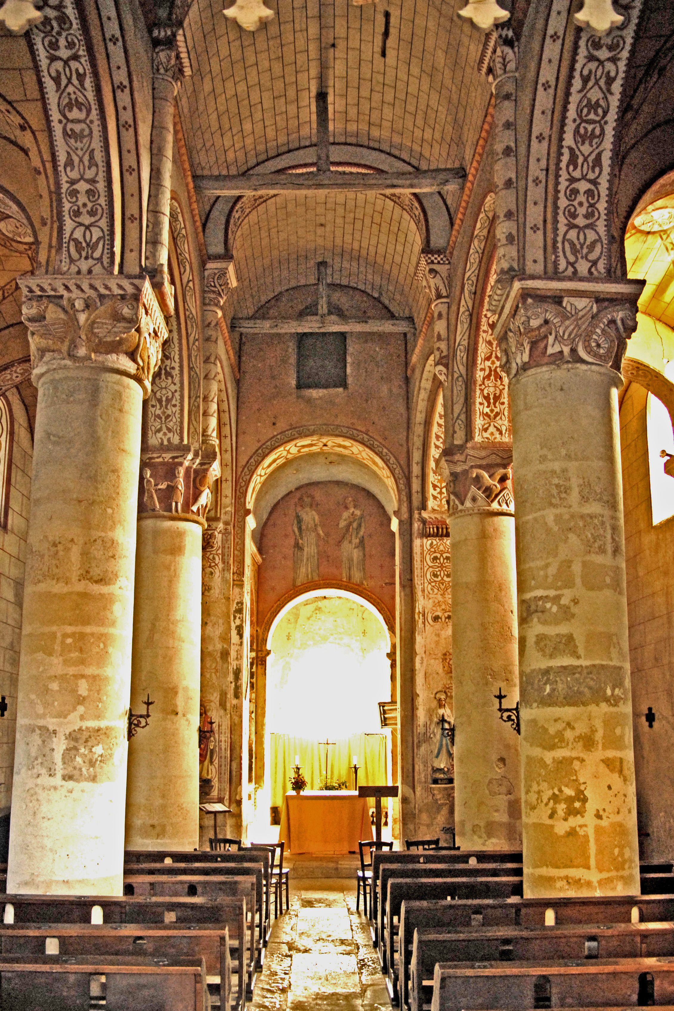 Civaux, Dorfkirche Mittelschiff